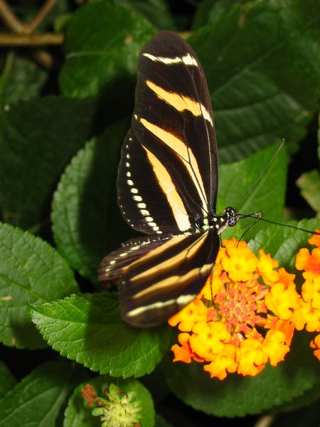 Zebra Heliconian, also known as Zebra Longwing (Heliconius charithonius). Picture taken by Donar Reiskoffer.